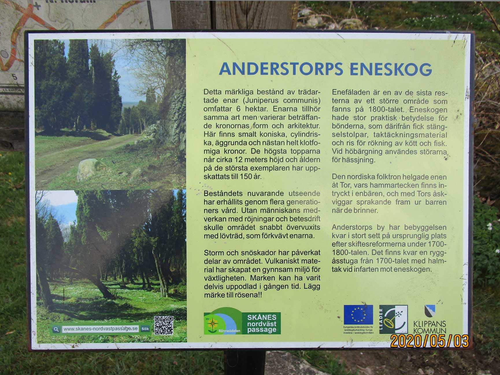 Skylten om Anderstorps eneskog maj 2020